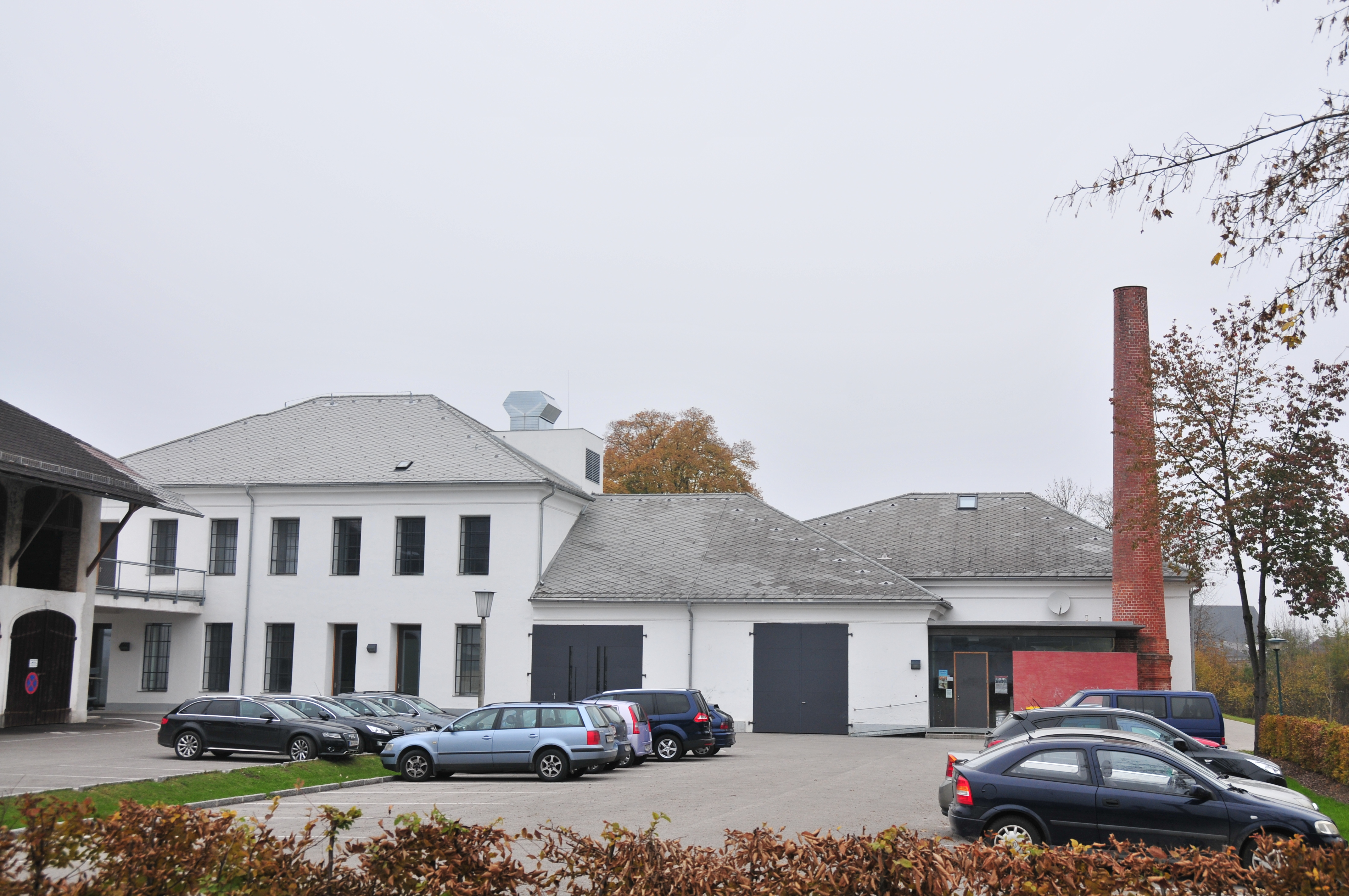 Ehem. Kitzmantel Lederfabrik (ohne südlichen Anbau von 1950)